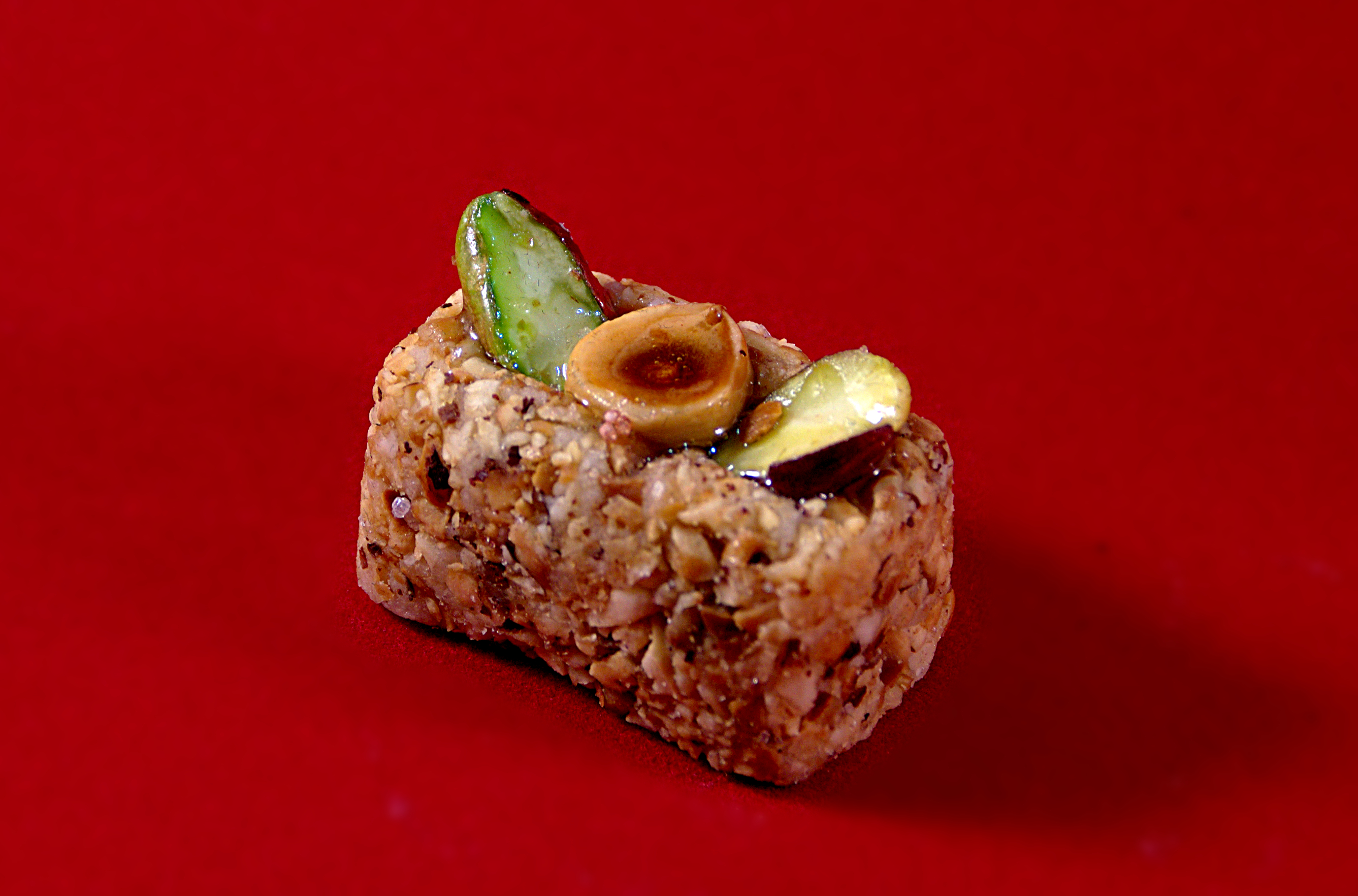 Pâtisseries tunisiennes traditionnelles.